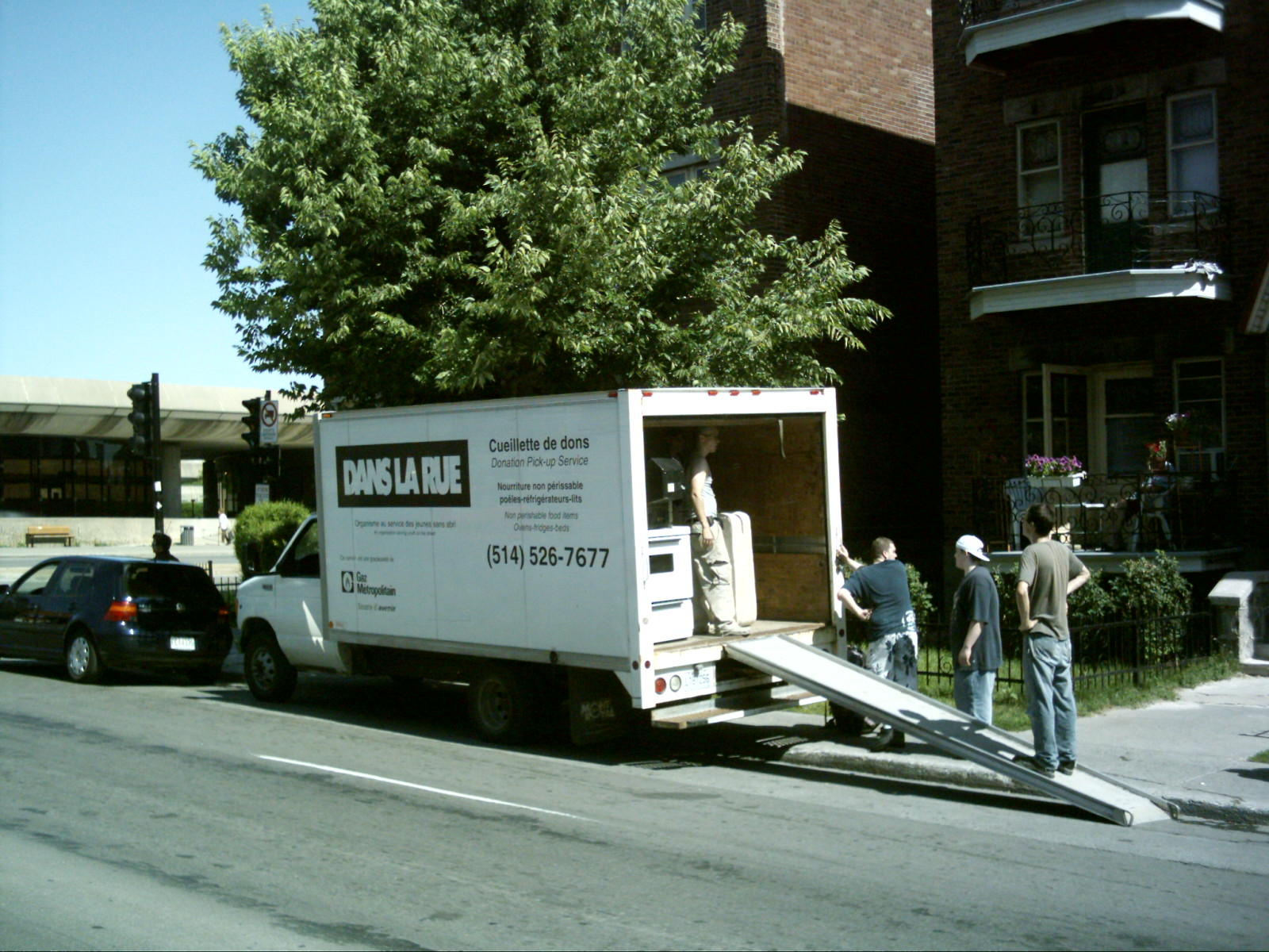 Véhicule utilitaire de l'organisme Dans la rue à l'oeuvre lors de la journée des déménagements au Québec.